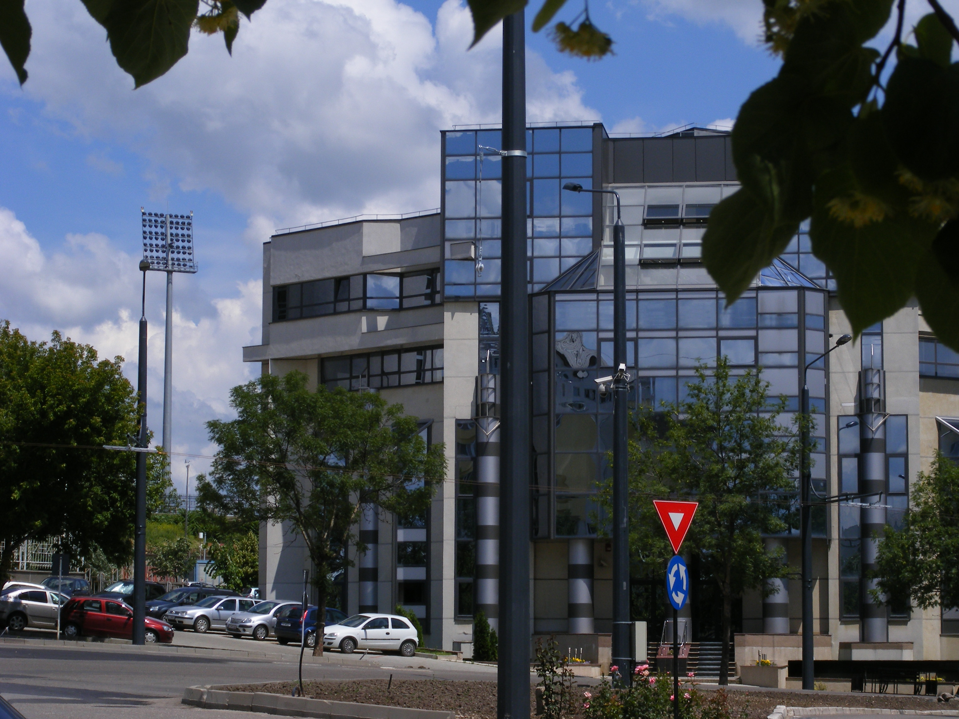 cel mai mare giratoriu din oras